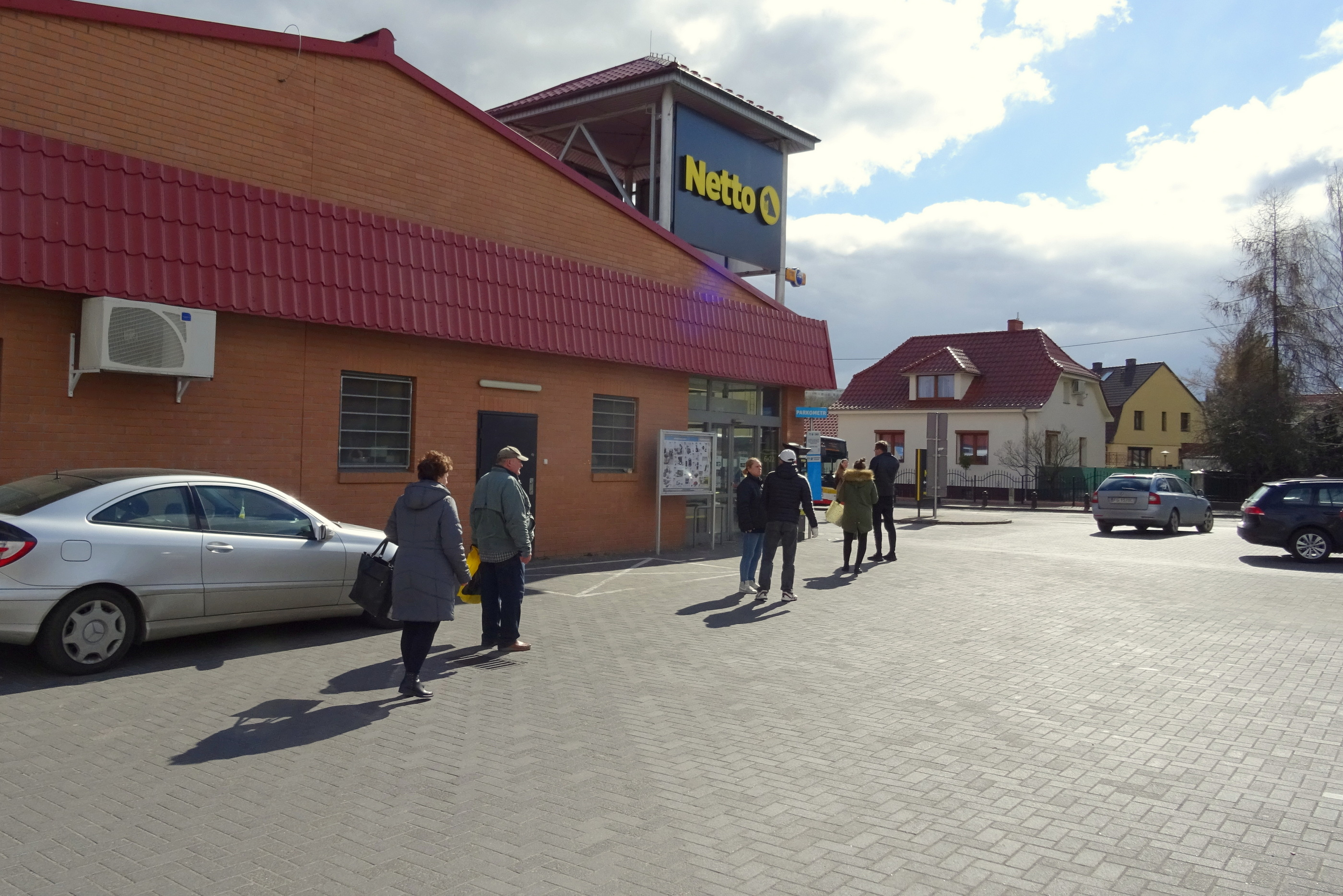 Pandemia wirusa SARS-CoV-2 w Polsce (Gorzów Wlkp.). Klienci, zachowując dystans między sobą, oczekują na wejście do sklepu. Do wnętrza wchodzi się pojedynczo, po wyjściu osoby która dokonała zakupu.